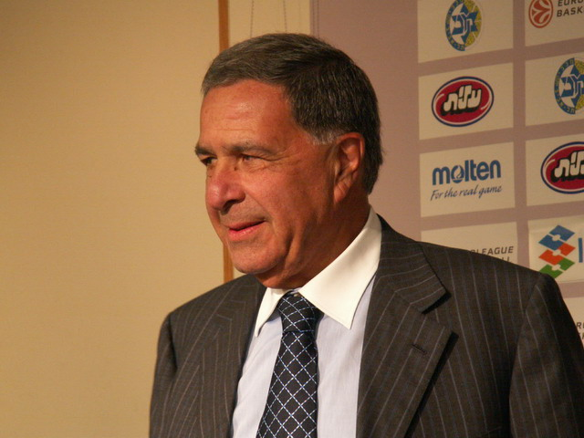 שמעון מזרחי, יו"ר מכבי תל-אביב צולם על-ידי אבי קדמי This picture was taken by Avi Kedmi